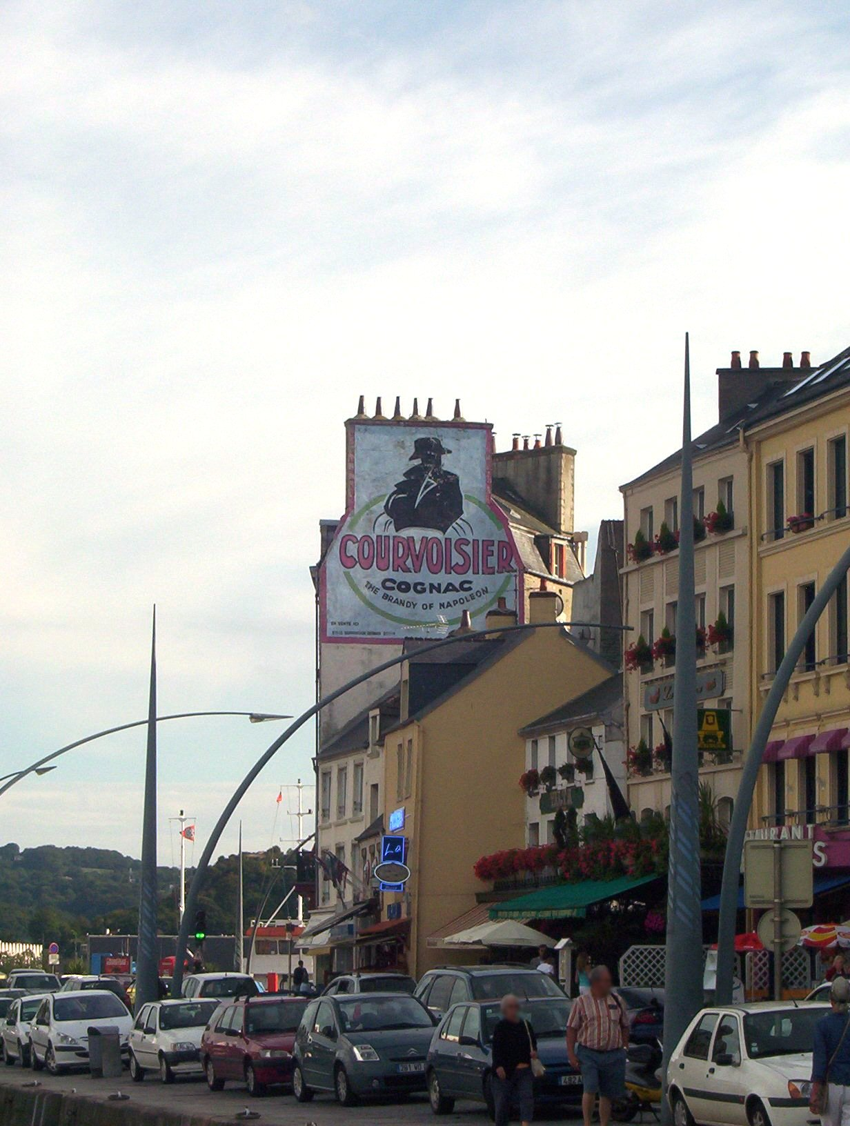 Cherbourg, France : Napoléon est partout à Cherbourg. Vieille publicité pour le cognac Courvoisier. Quai de Caligny.